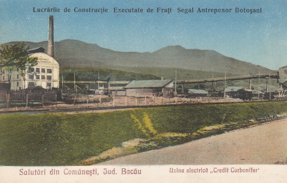 Centrala electrică nr. 1 a societăţii Creditul Carbonifer Comăneşti.